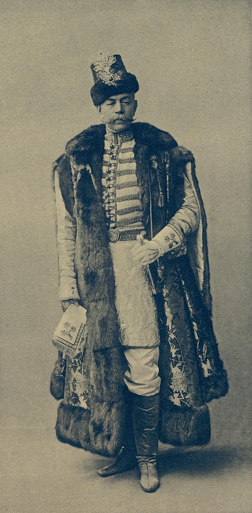 Генерал-Адъютант Александр Петрович Струков в костюме воеводы XVII века.